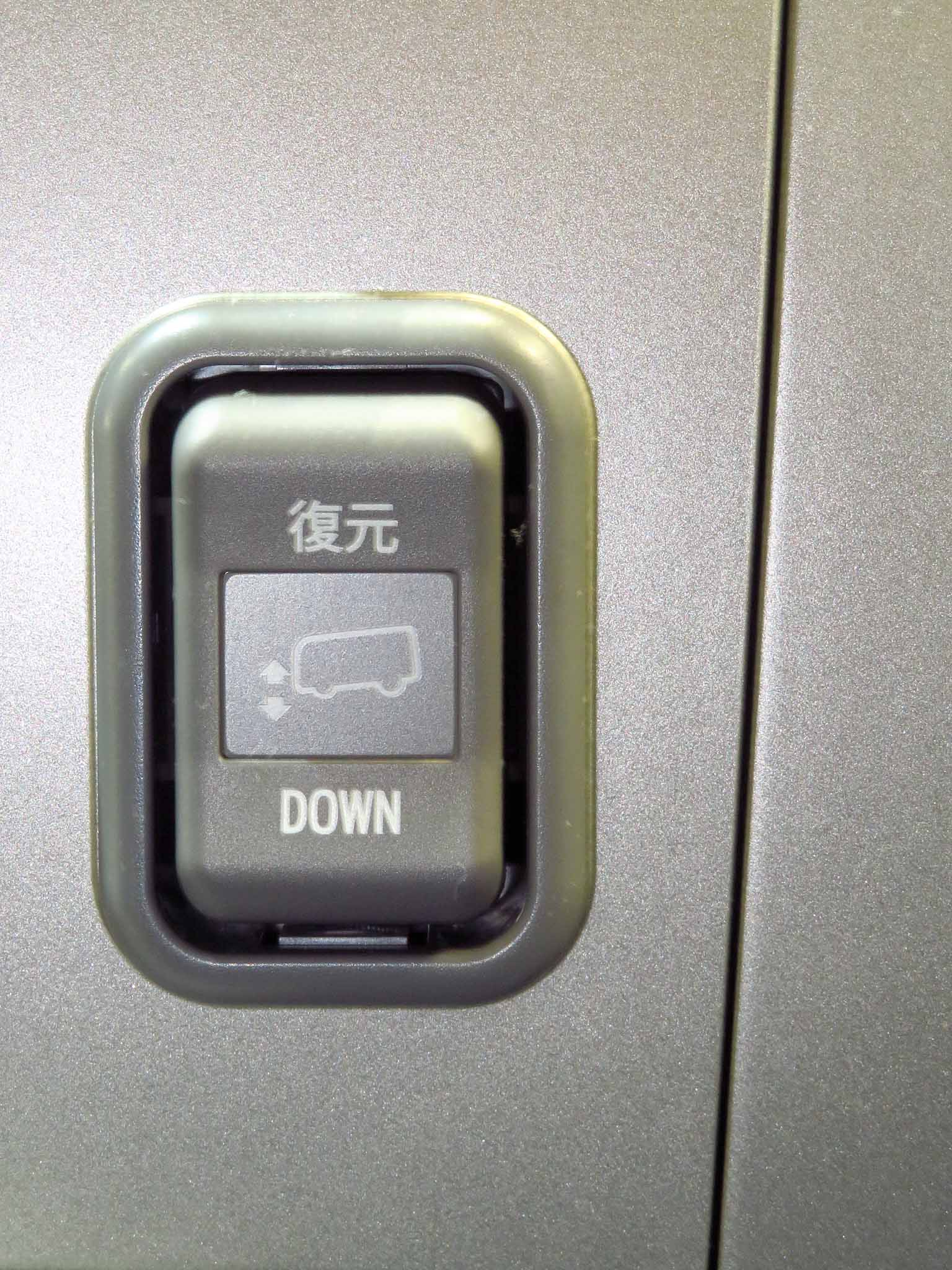 日野・セレガHD-Sの車高調整スイッチ。主に空気バネの空気を抜いて車高を下げるために用いられる。